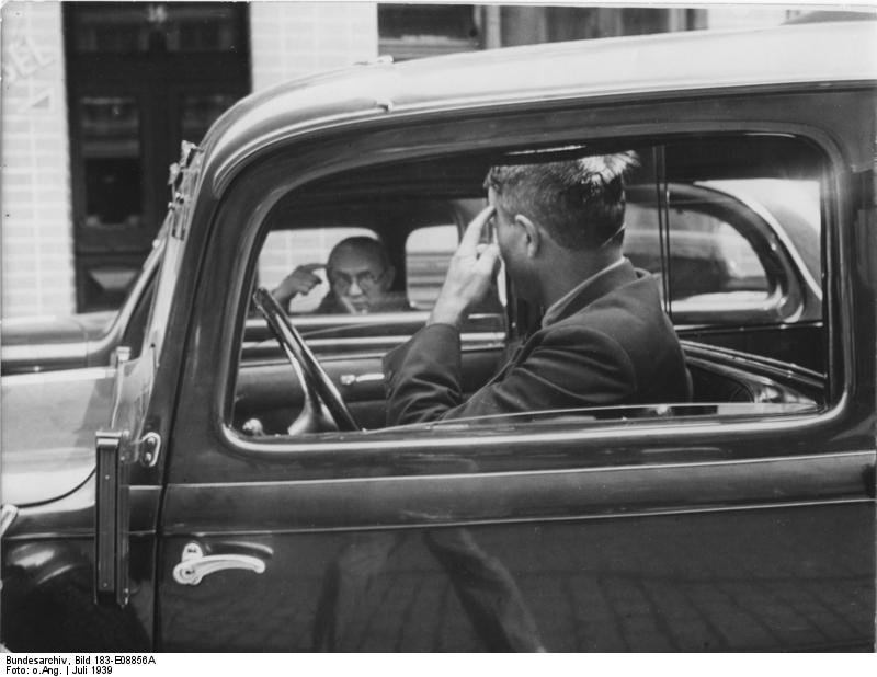 Berlin, "Höflichkeit" unter Autofahrern Scherl Bilderdienst: Kraftfahrers Höflichkeit und Unhöflichkeit Es zeugt bestimmt von wenig Kameradschaft, wenn sich Kraftfahrer bei den geringsten Anlässen gleich einen "Vogel" zeigen. Foto: Wag[ner], 19.7.1939 9241-39 [Berlin]